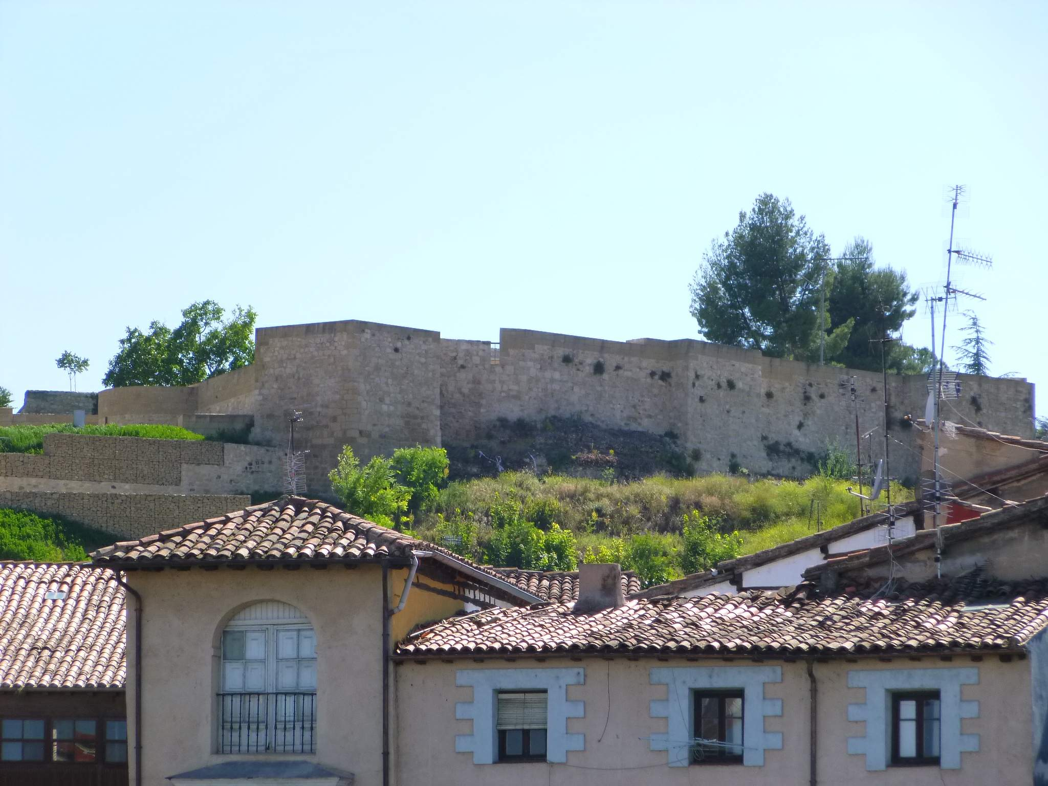 Miranda de Ebro - Castillo